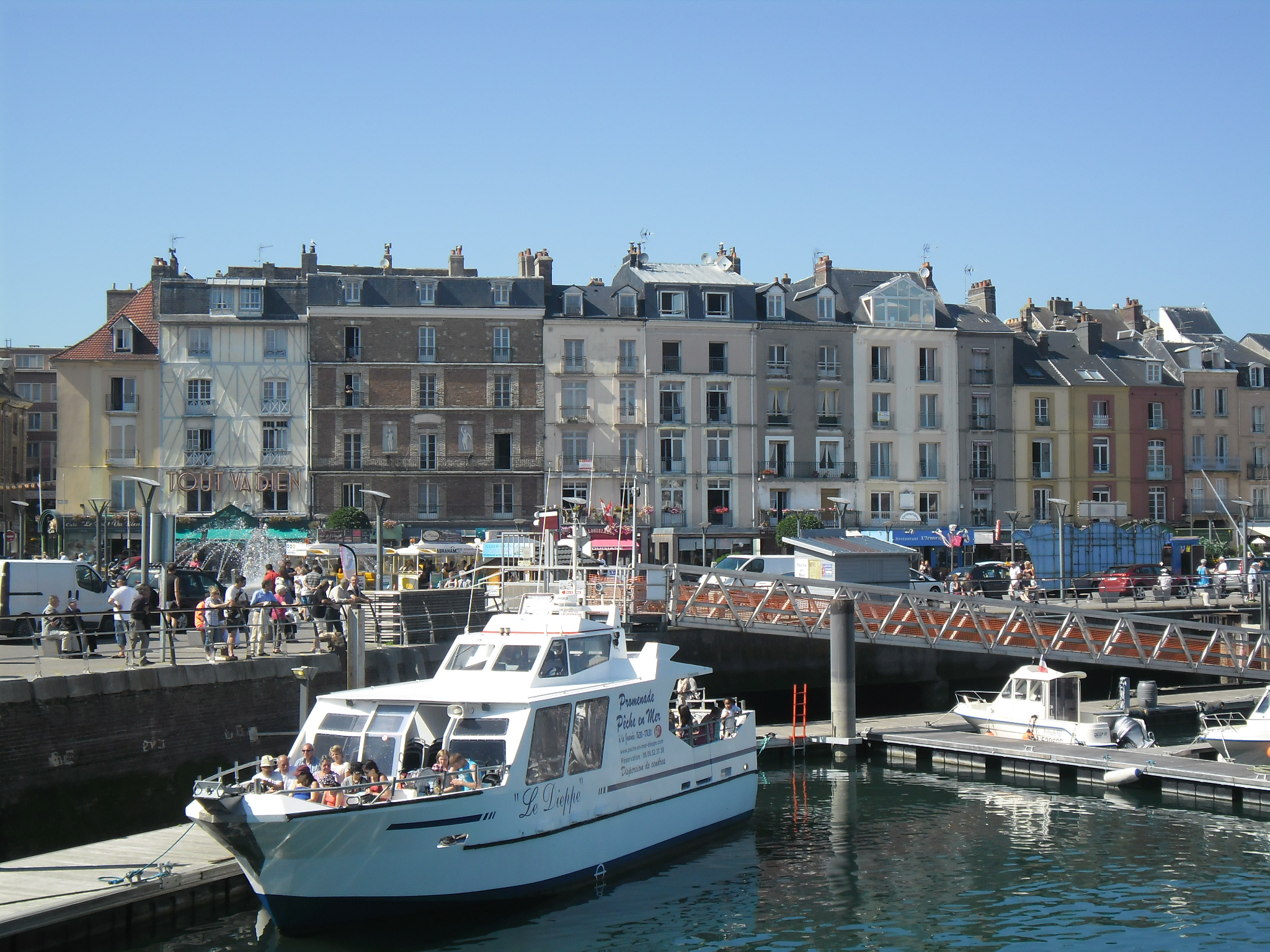 Port de Dieppe et quai Henri IV